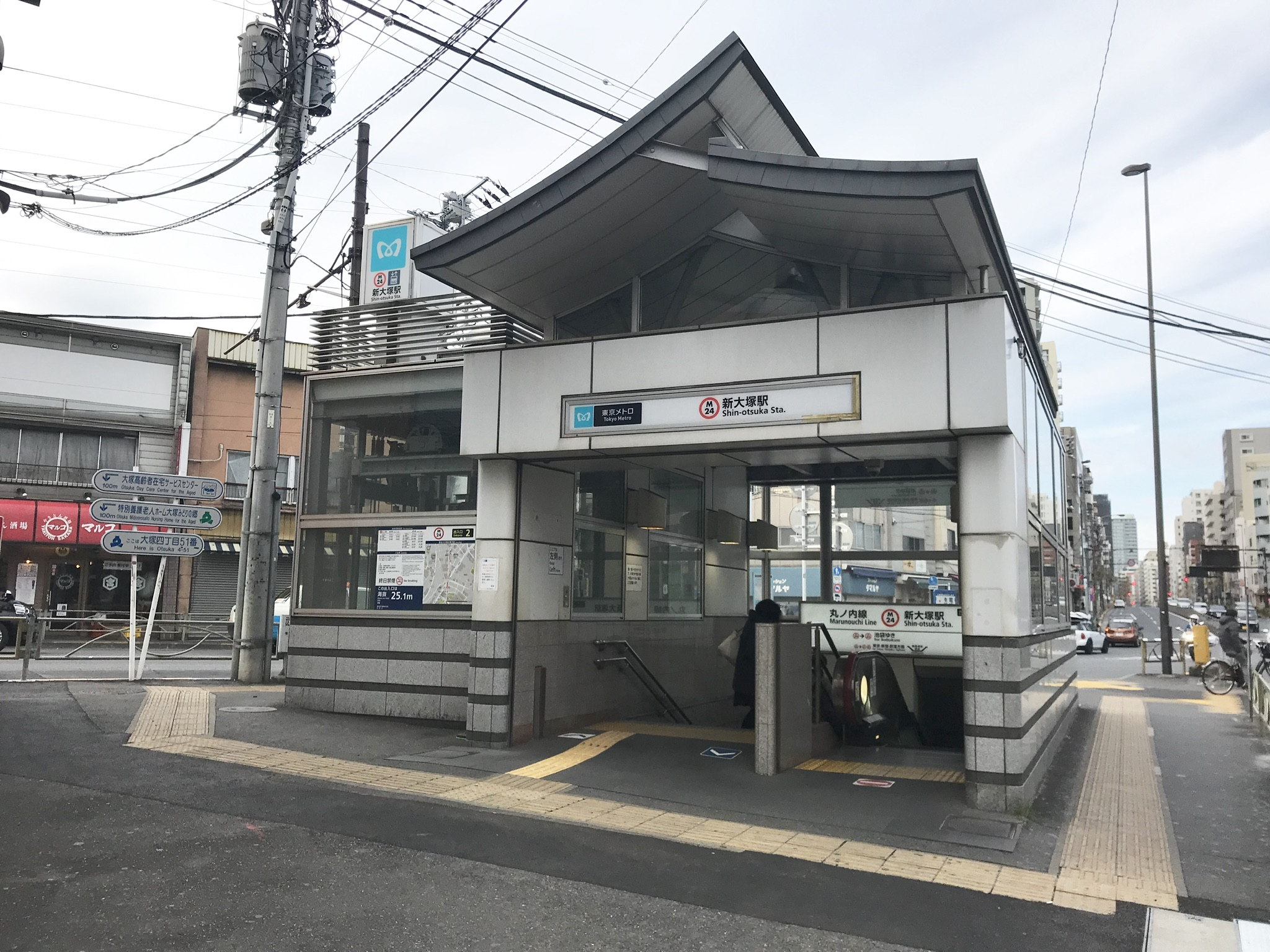 東京メトロ丸ノ内線新大塚駅2番出入口